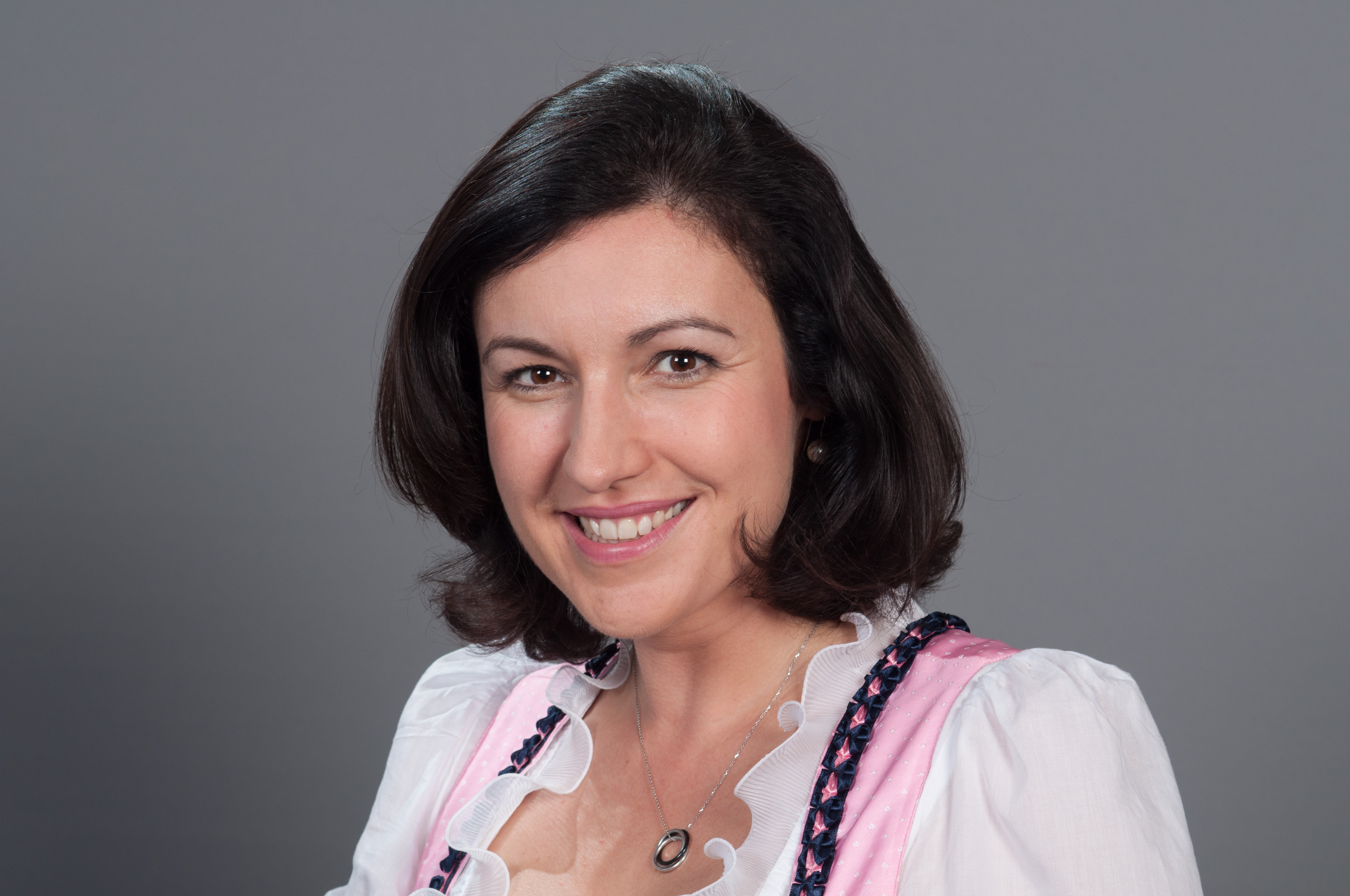 Dorothee Bär (CSU), MdB